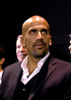 Juan Sebastián Verón, el futbolista del Club Estudiantes de La Plata, al asumir como presidente de la institución.